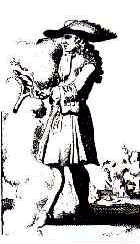 Jacques Aymar-Vernay, paysan de Saint-Véran en Dauphiné qui vivait à la fin du XVIIe siècle et, prétendait posséder la faculté de découvrir, à l'aide d'une baguette de coudrierles eaux souterraines et les métaux, mais même les malfaiteurs. Il fut démasqué par le prince Henri de Bourbon-Condé.